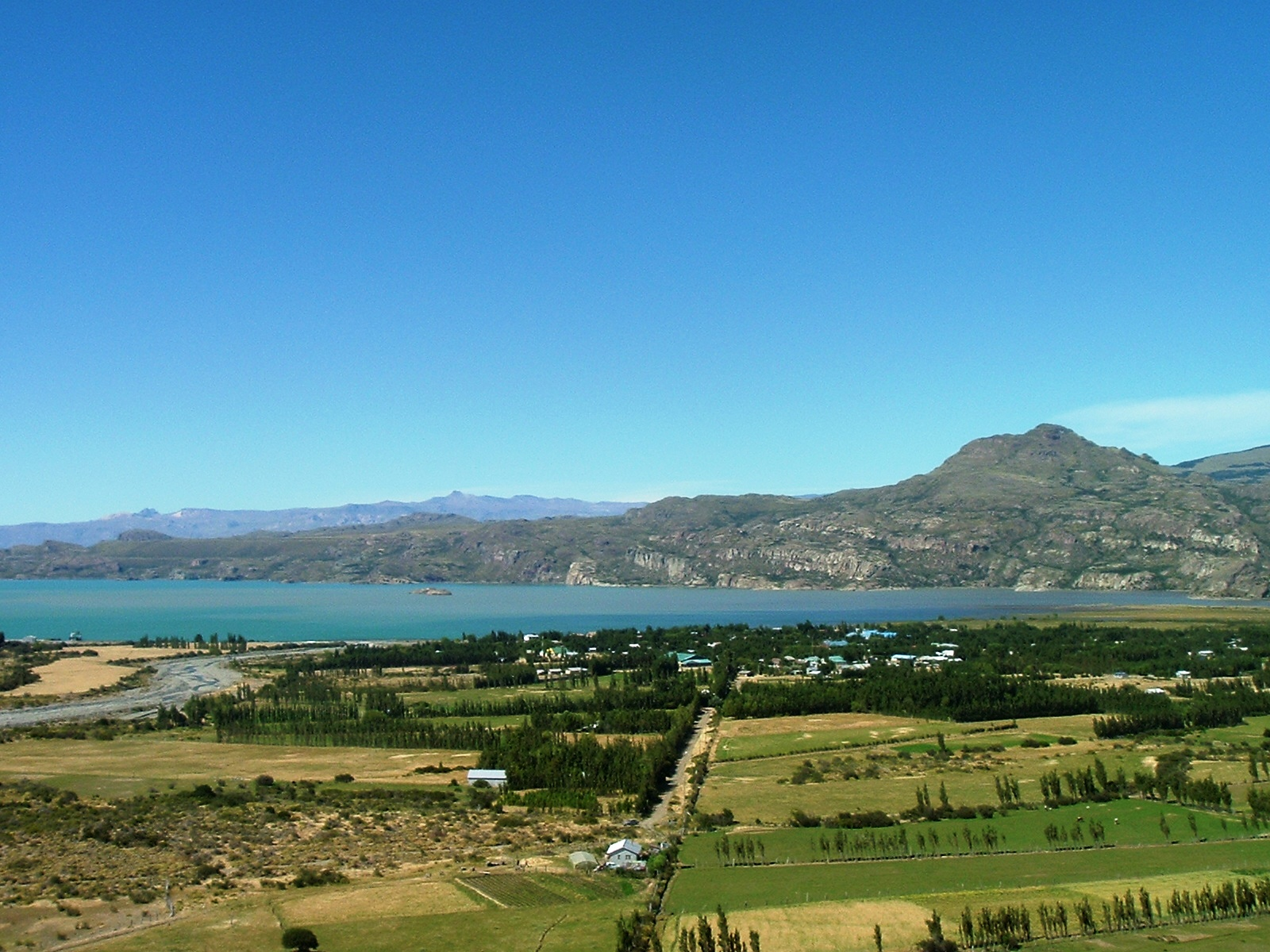 La localidad de Puerto Ingeniero Ibáñez vista desde el camino.